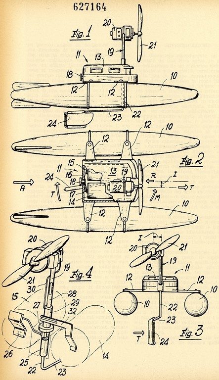 Disegno per il brevetto per invenzione industriale n. 627164, classe A 63 h., della società Arcofalc di Claudio Cecchetti per un natante giocattolo ad elica aerea con gruppo elica-motore elettrico ruotabile in diversi orientamenti, Cernusco sul Naviglio (MI). Data di deposito: 20 aprile 1960. Data di concessione: 26 ottobre 1961 (AS Genova, Ufficio provinciale industria, commercio e artigianato di Genova, Fondo Brevetti)